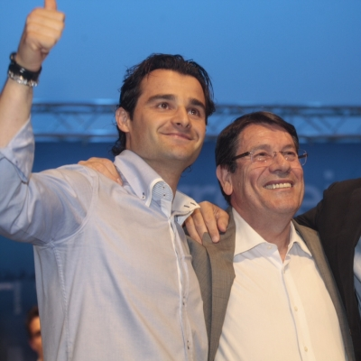 Eduardo Dolón (izquierda, candidato a alcalde por el PP) y Pedro Hernández Mateo (derecha, alcalde saliente) en un mitin en Torrevieja en mayo de 2011, durante la campaña electoral de las municipales de 2011